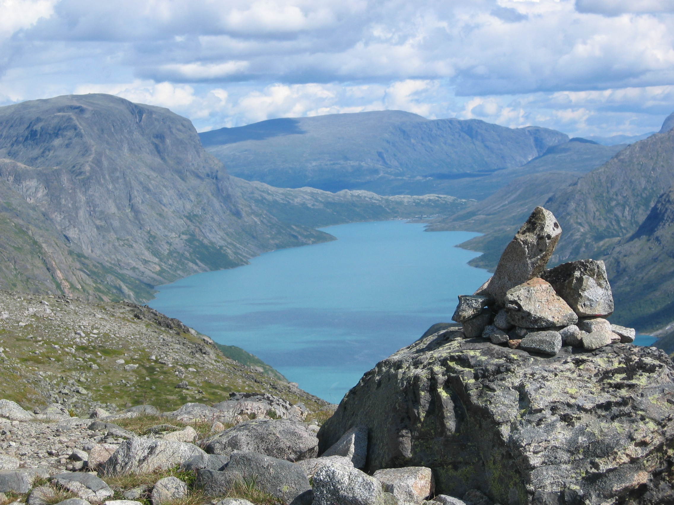 Gjende Lake in Jotunheimen, the Besseggen trail can be seen on the left.